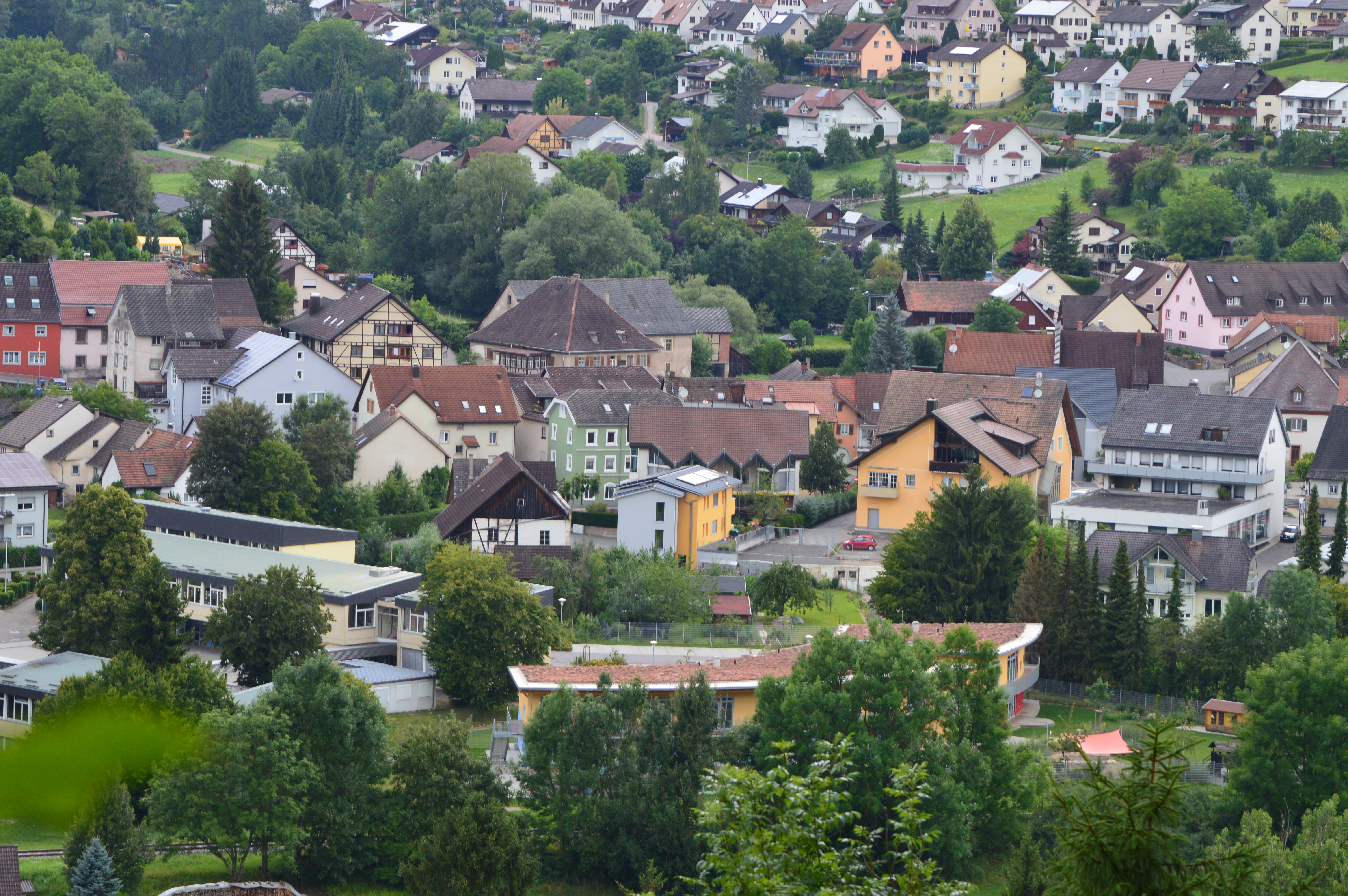 S Zentrum vom Stüèlinger Unterdorf.